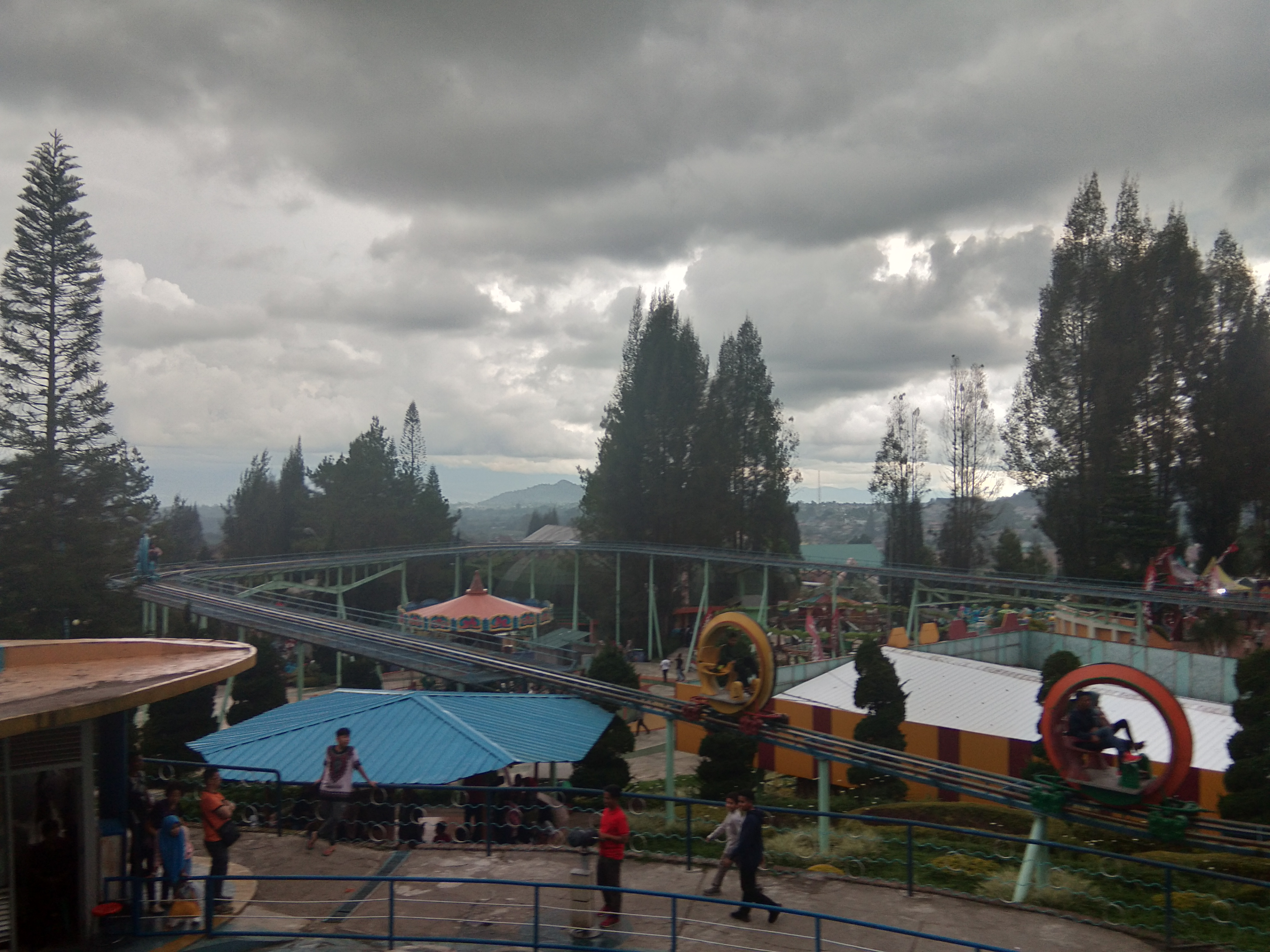 Diliat dari atas